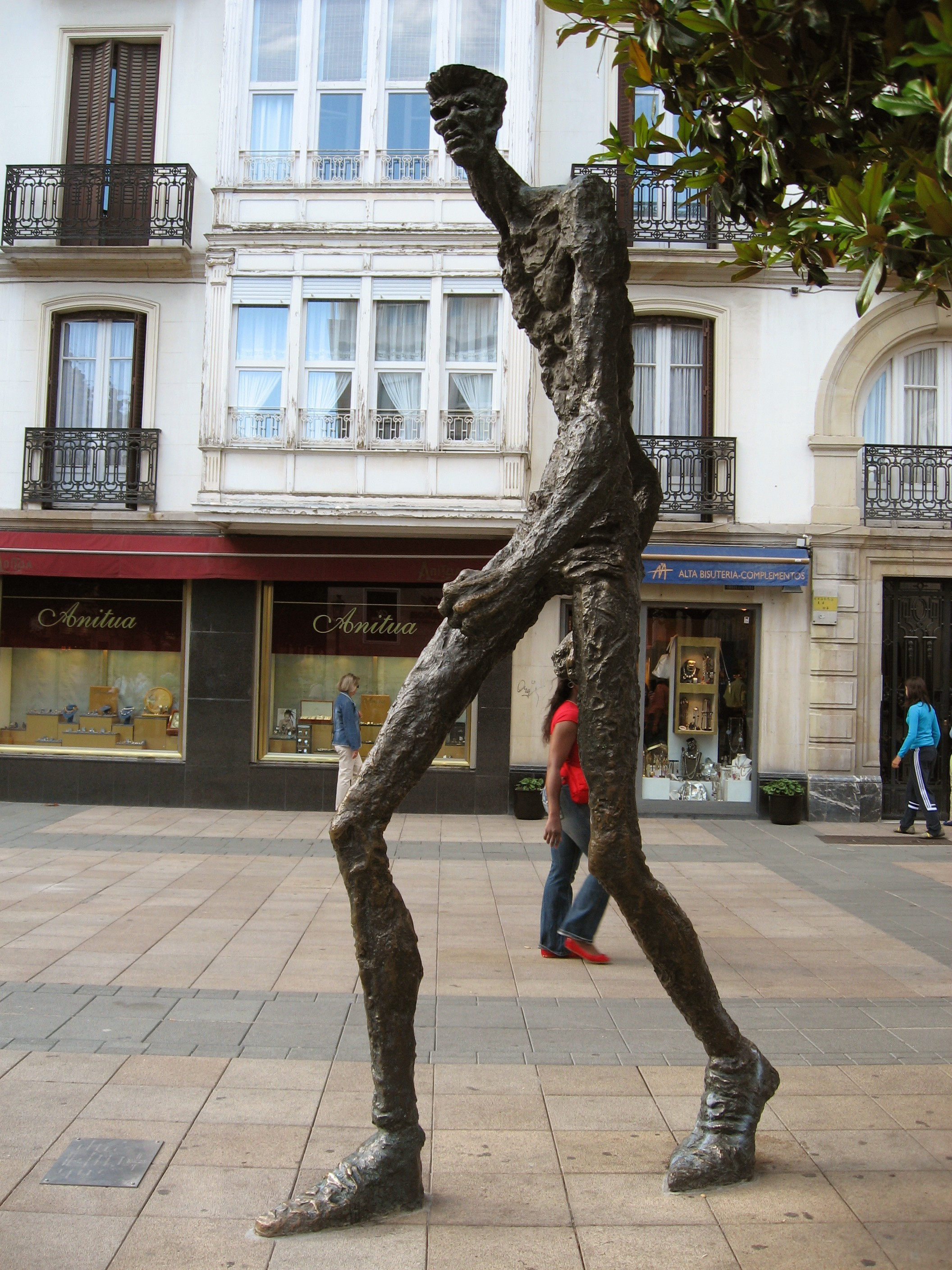 Desc: Estatua de El Caminante, en la intersacción de las Calles San Prudencio y Dato. Vitoria-Gasteiz